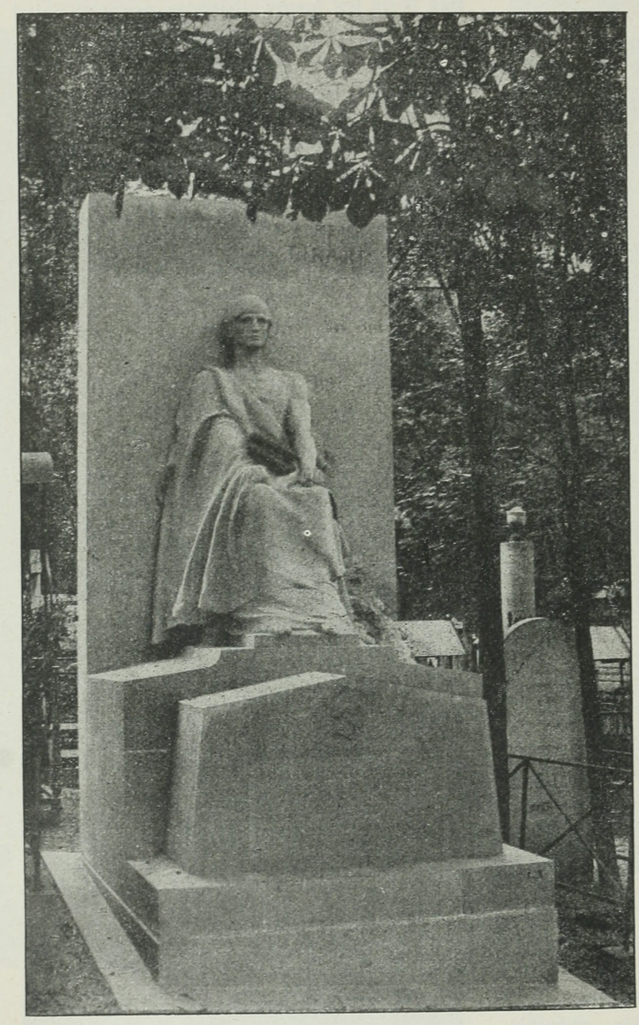 Planche tirée de Le Monde moderne, tome IV, juillet-décembre 1896.